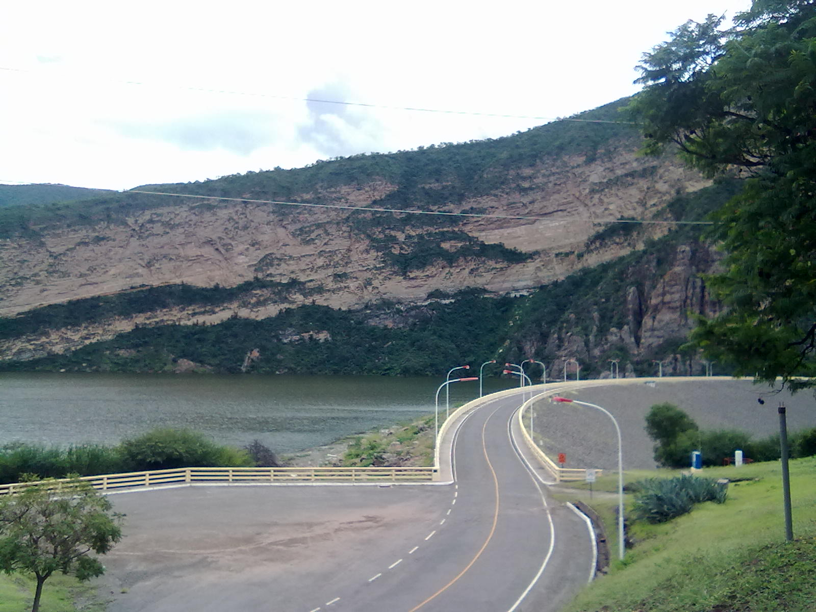 Presa General Manuel Belgrano, embalse Cabra Corral, Salta, Argentina